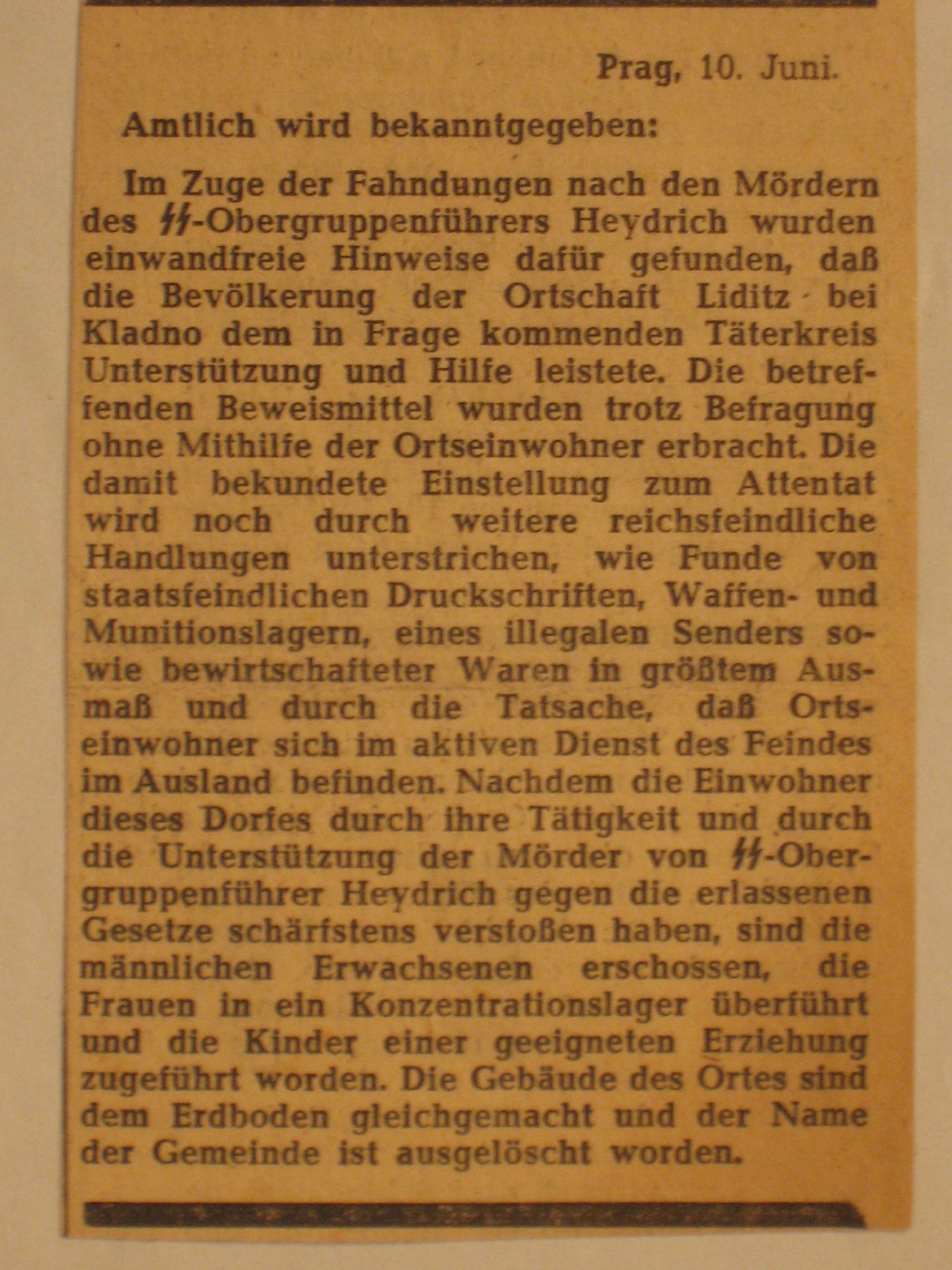 Photograph of bulletin of the german occupation forces in prag